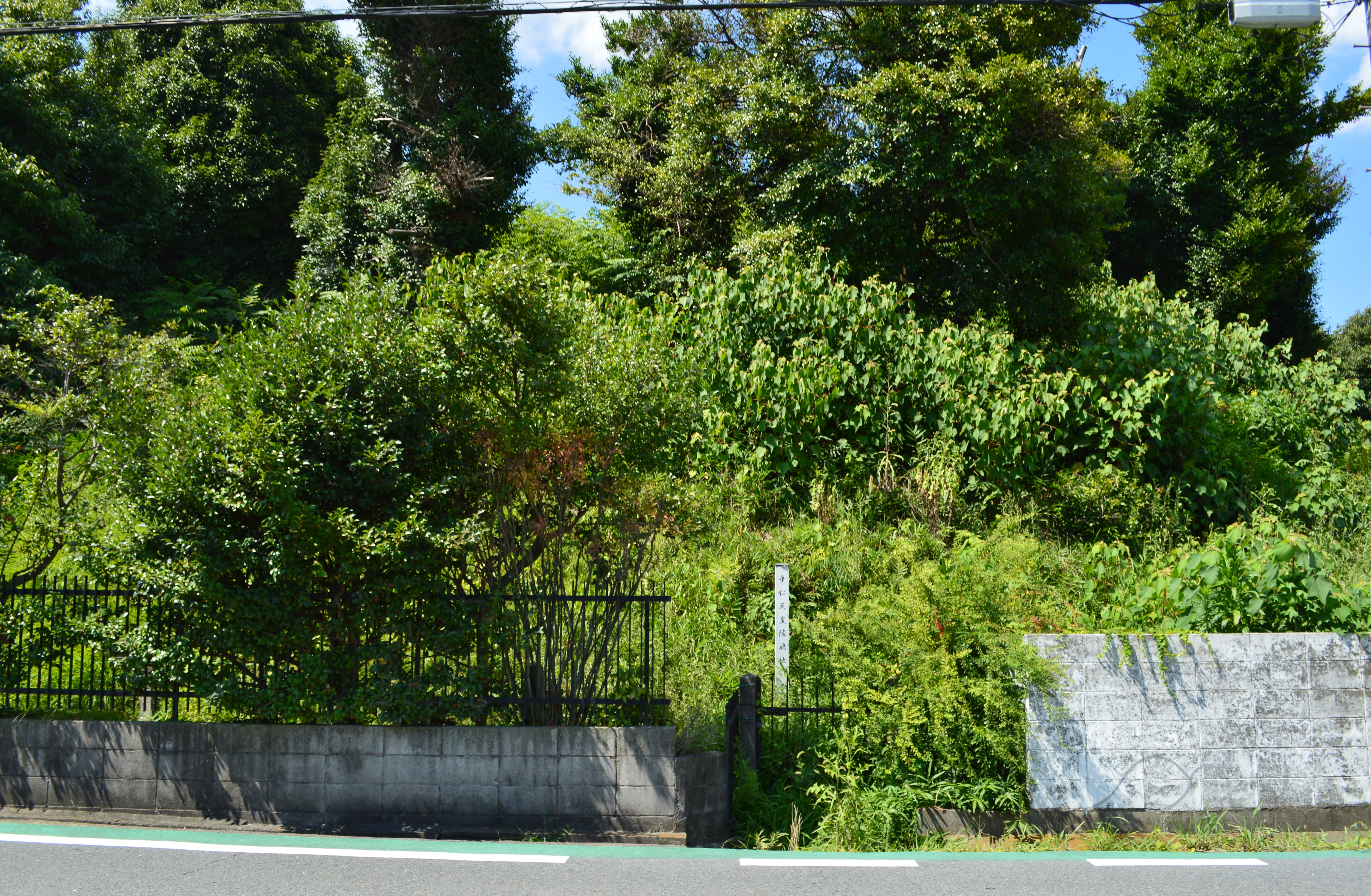 垂仁天皇菅原伏見東陵 陪冢い号